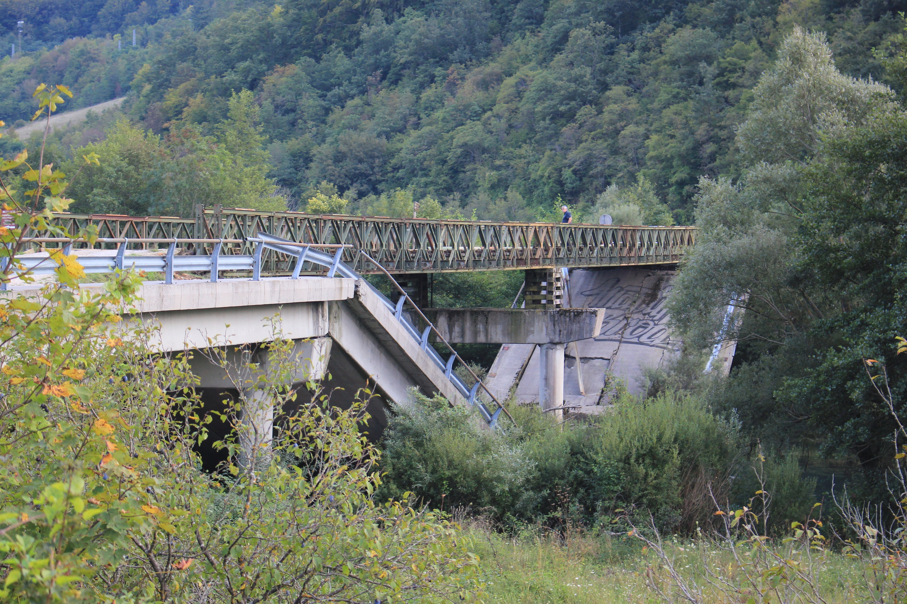 Im Bosnienkrieg zerstörte Brücke über die Una in Martin Brod.